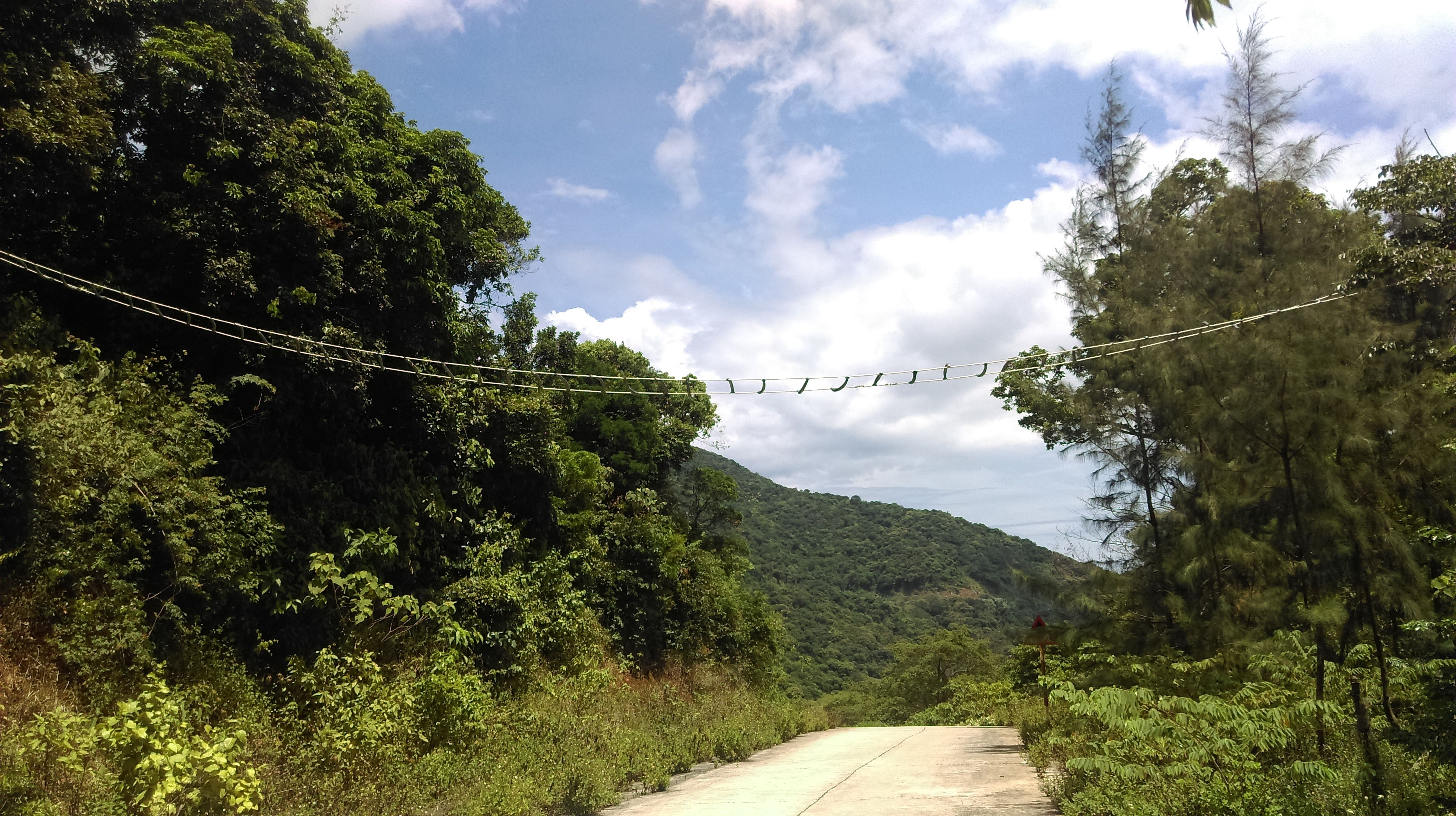 Cầu treo cho Khỉ, Sơn Trà, Đà Nẵng